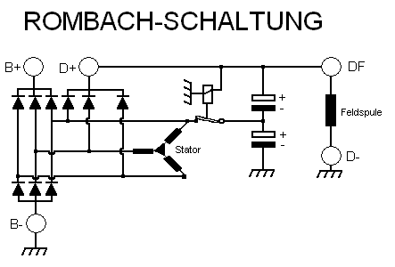 Schaltplan der Rombach-Schaltung